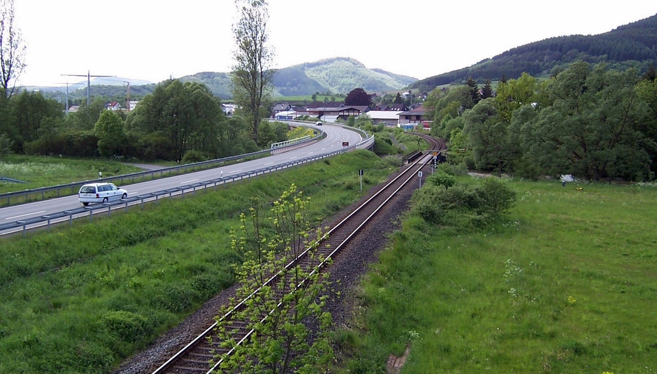 Straßen- und Eisenbahnbrücken über die Lahn bei Wallau